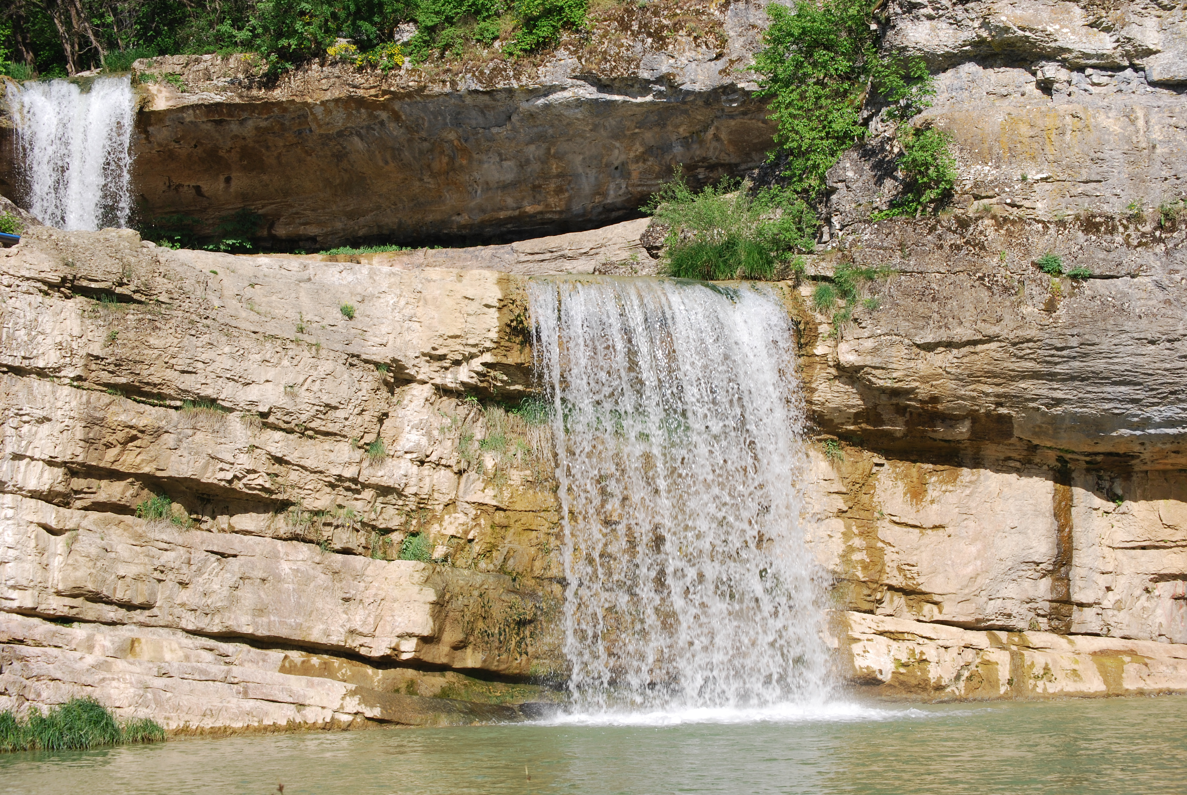 Mirusha